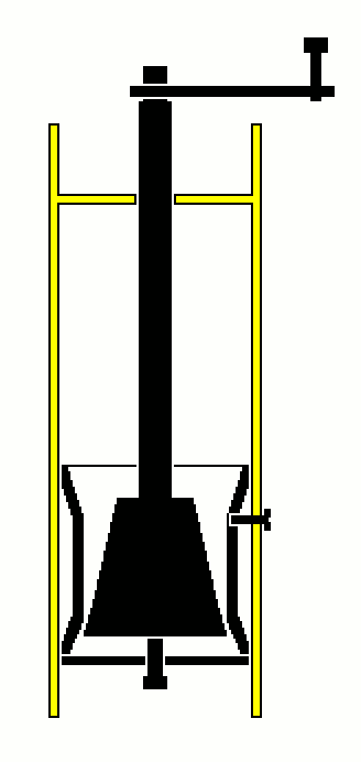 Схема ручной кофемолки.